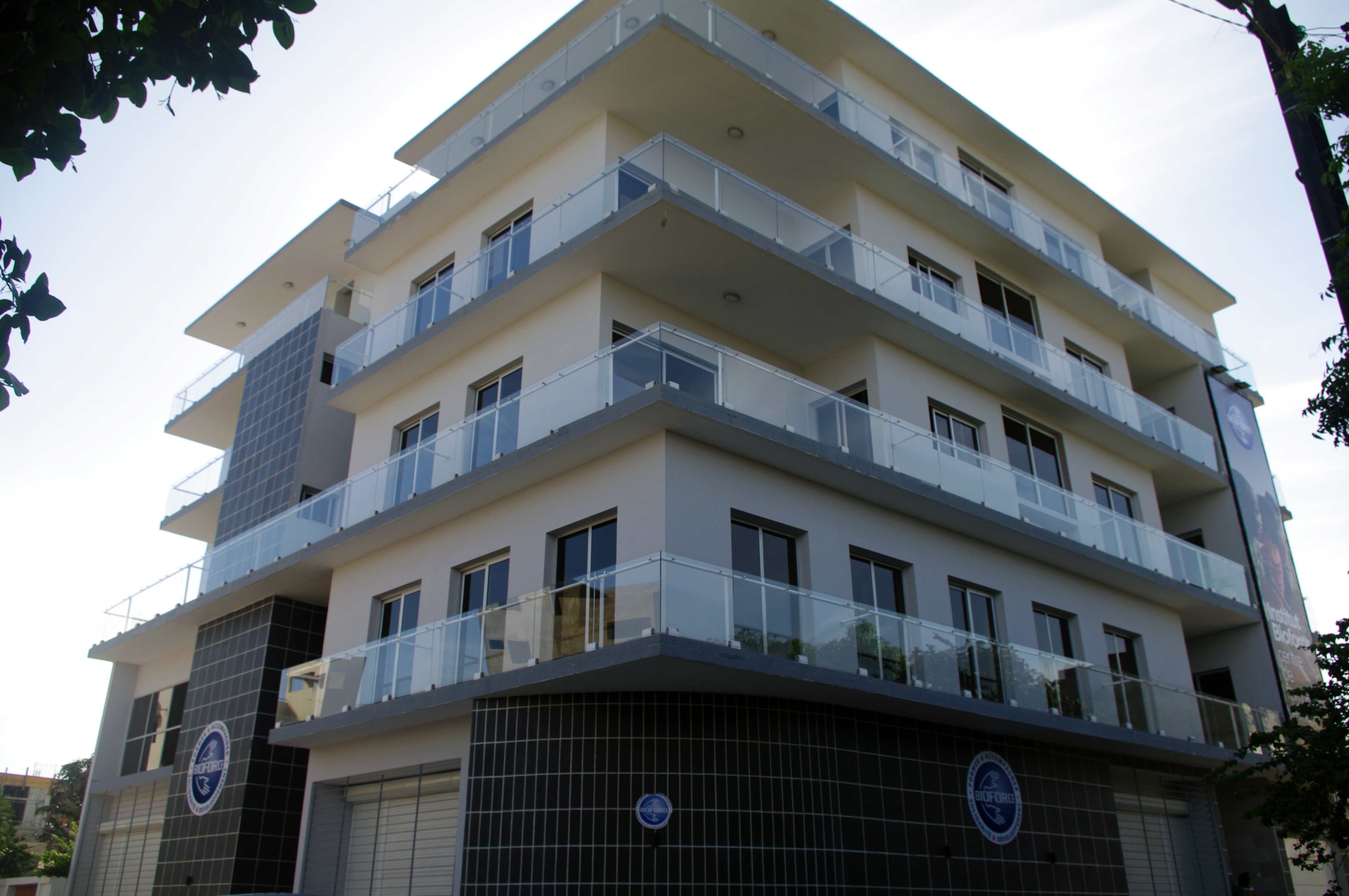 Vue du bâtiment de l'institut Bioforce à Dakar